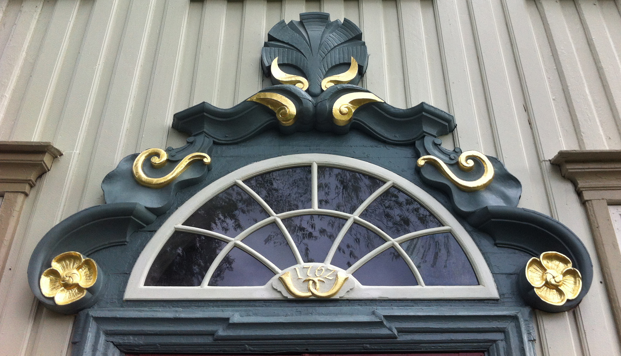 overstykket over havedøren på hovedbygningen, Lerchendal gård, Trondheim, ble totalrestaurert ved NTNUs snekkerverksted i 2013